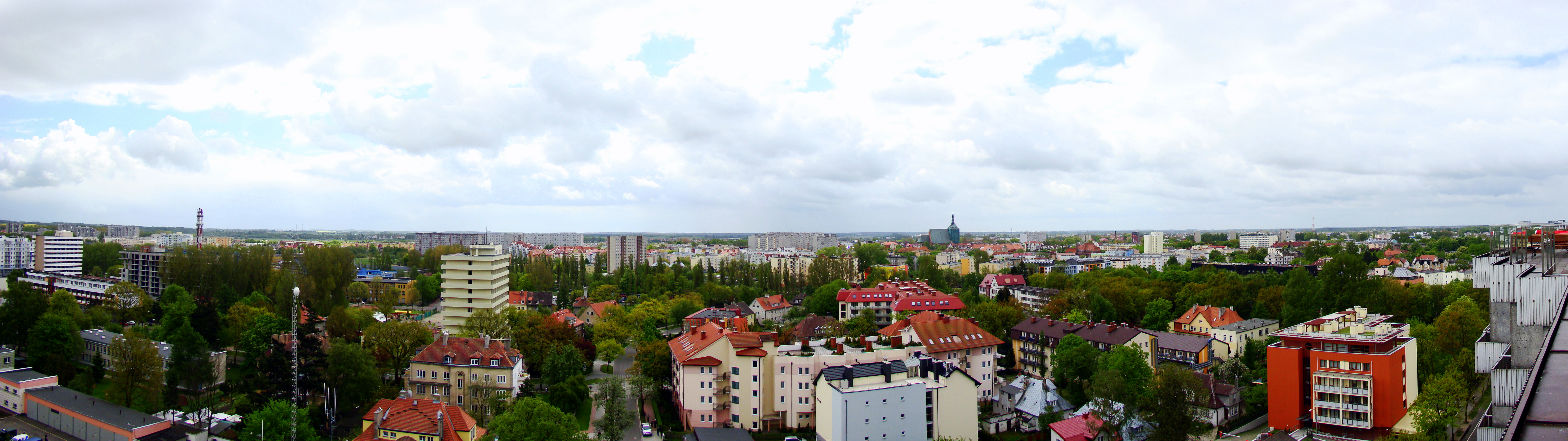 Panorama Kołobrzegu z kawiarni "Widokówka" w sanatorium "Kombatant"